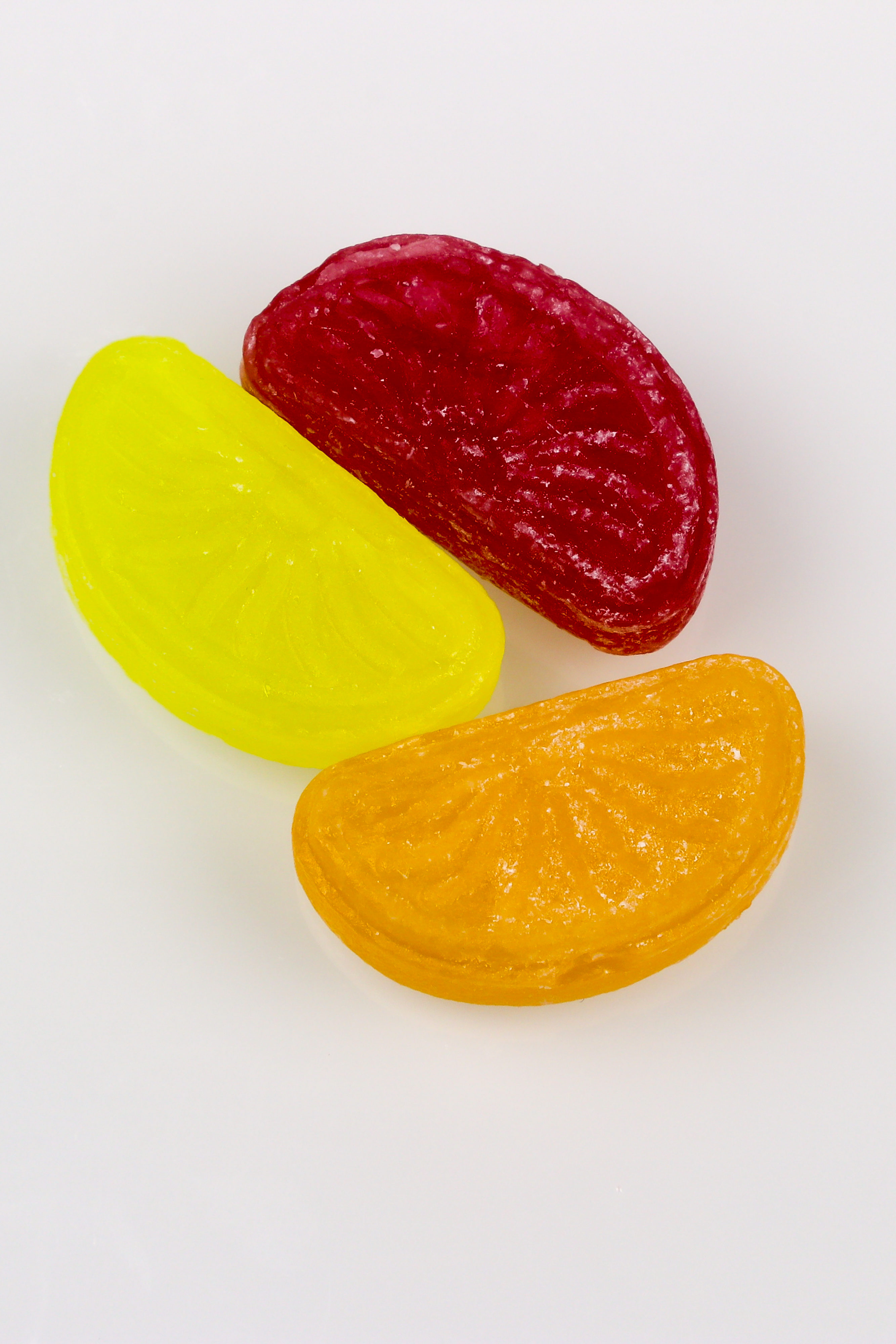 Bonbons in Form von Zitrusfruchtstücken